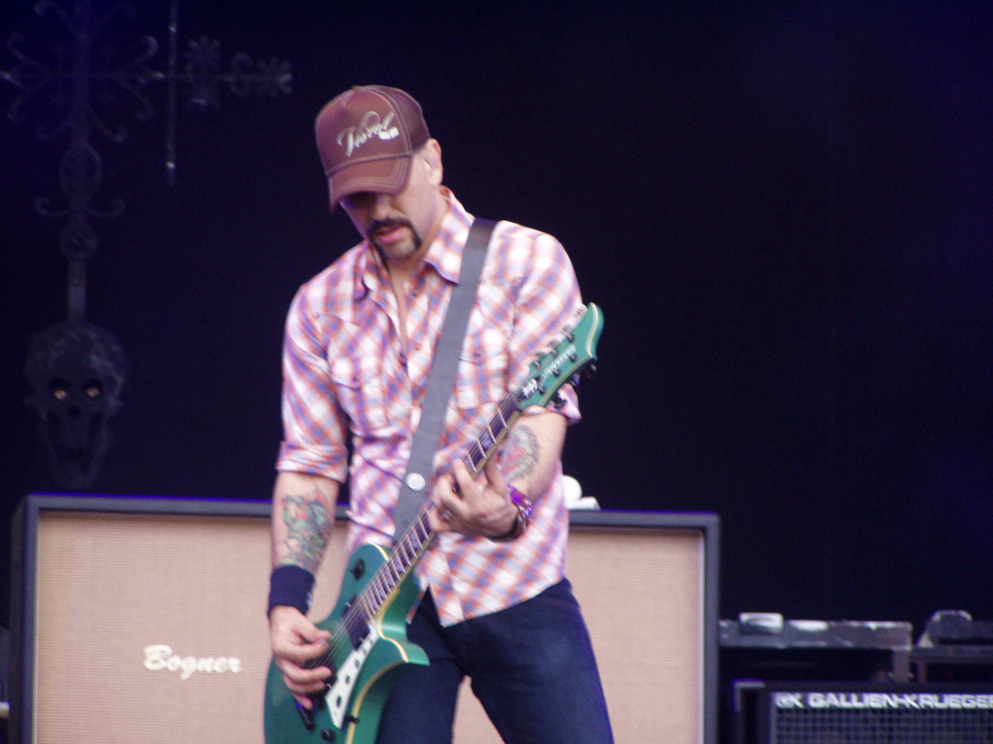 I Velvet Revolver al Gods of Metal 2007